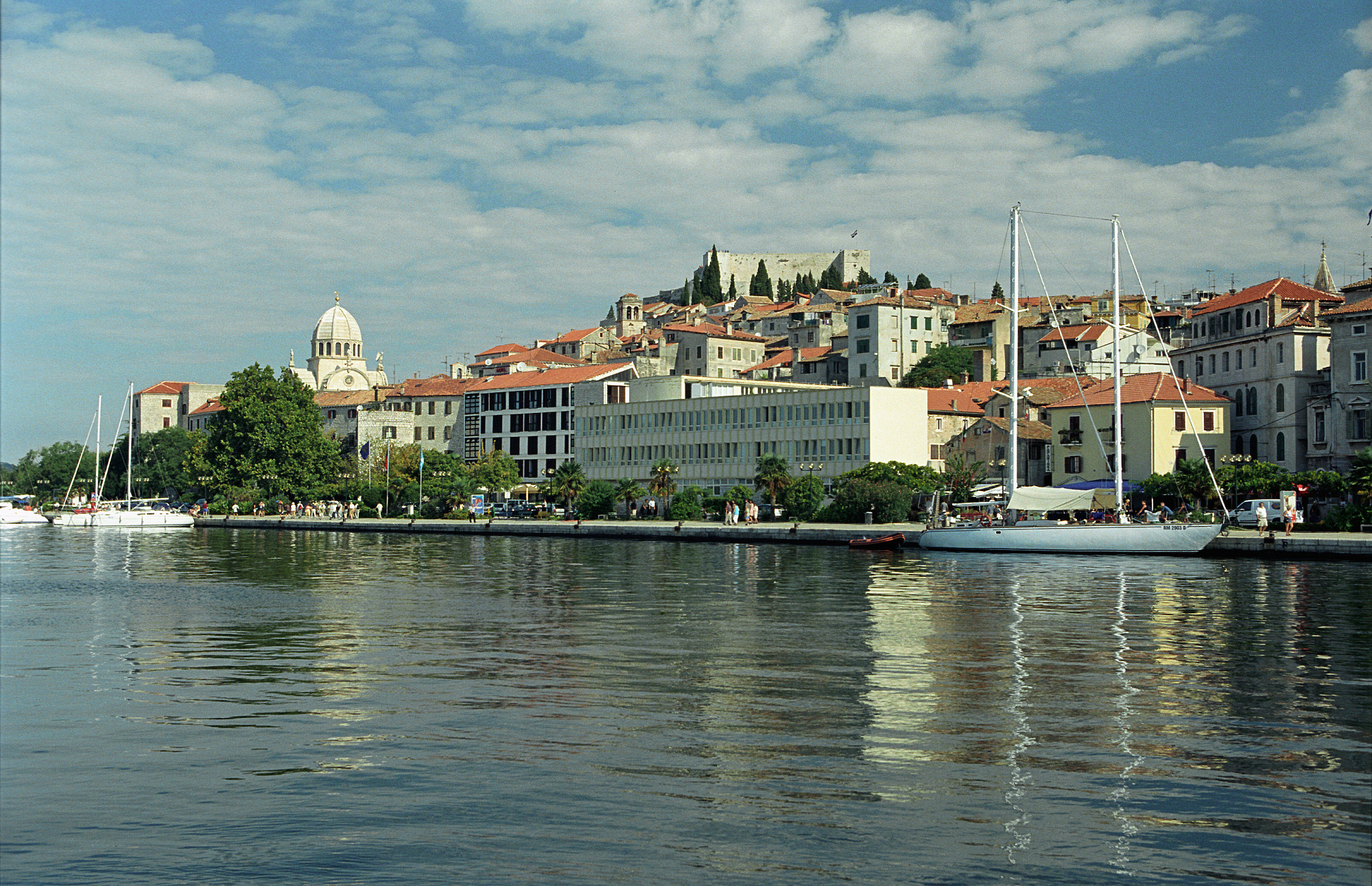 Šibenik, general view